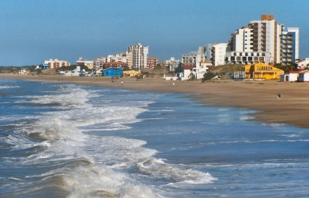 Pinamar, Buenos Aires Province, Argentina